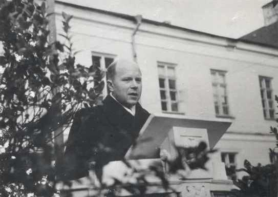 Edgar Kant Tartu ülikooli keemiahoone nugakivi panekul kõnet pidamas.